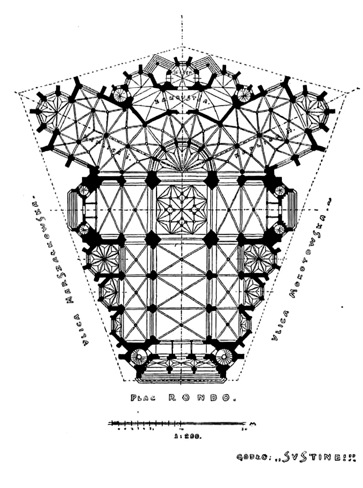 Конкурсний проект костелу Найсвятішого Збавителя у Варшаві. Не прийнятий до реалізації. Архітектор Ян Сас Зубжицький.